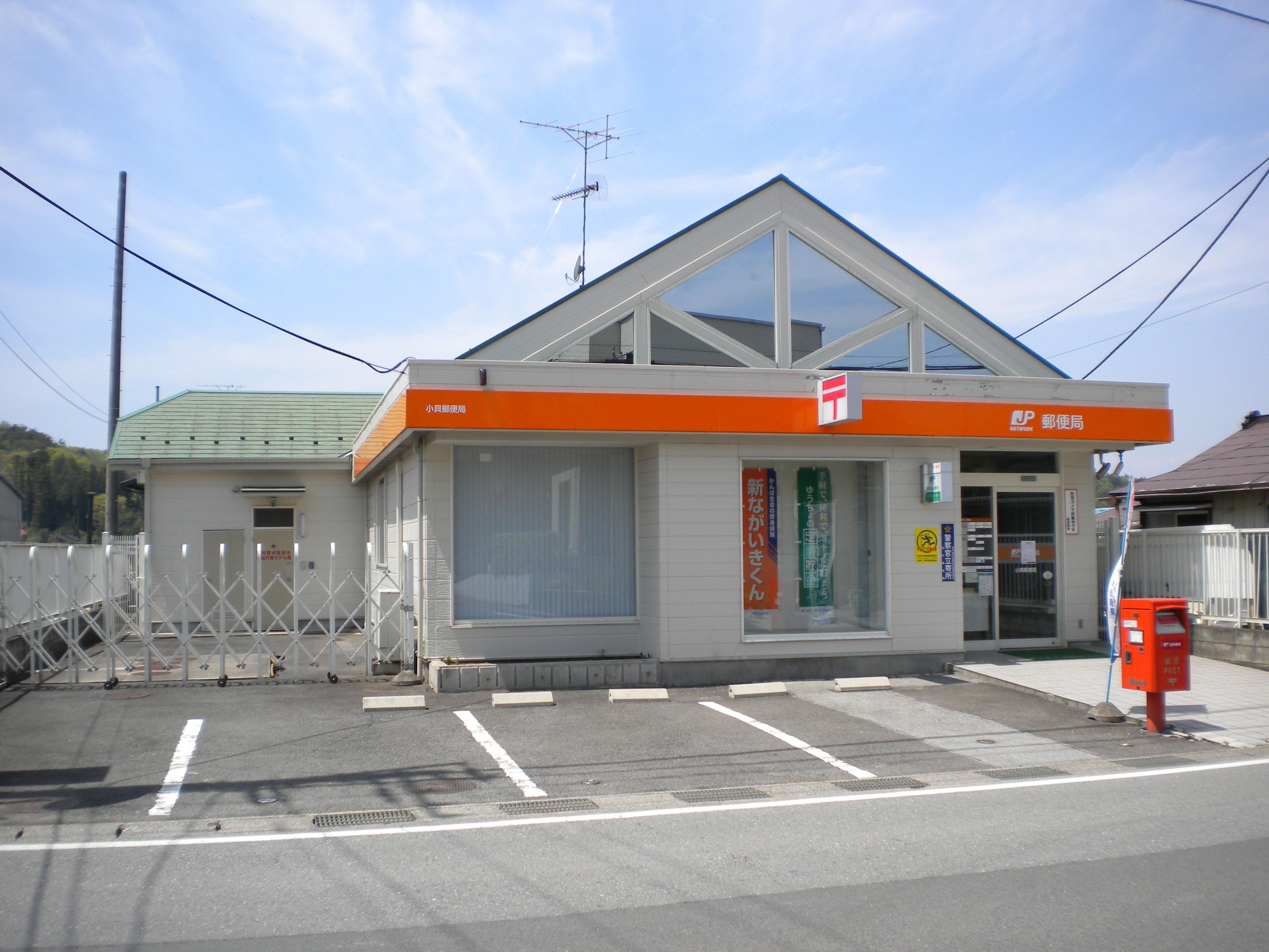 小貝郵便局 栃木県芳賀郡市貝町大字杉山 投稿者撮影